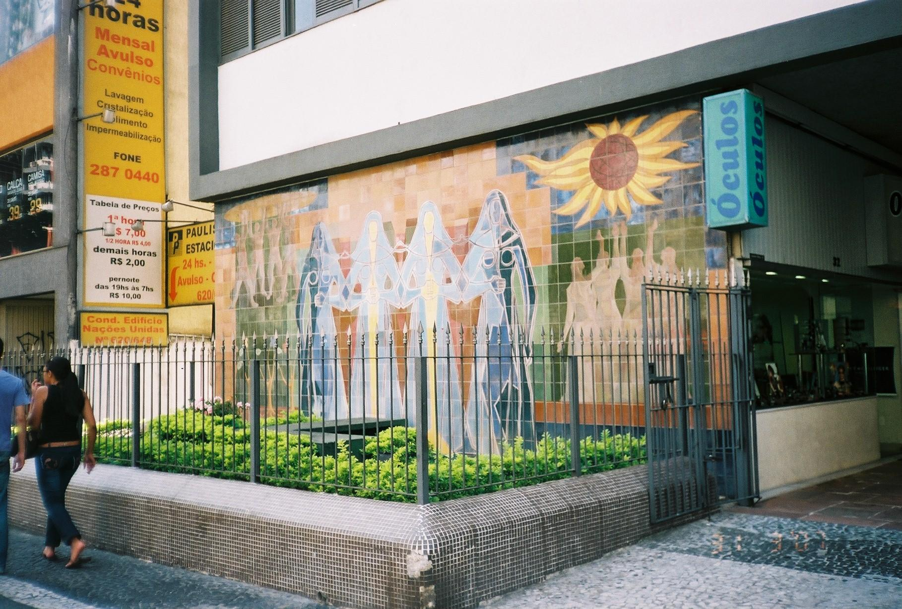 Edifício Nações Unidas - localizado na avenida Paulista, esquina com a Brigadeiro Luiz Antonio, em São Paulo, SP, Brasil. Painel pintado por um renomado artista